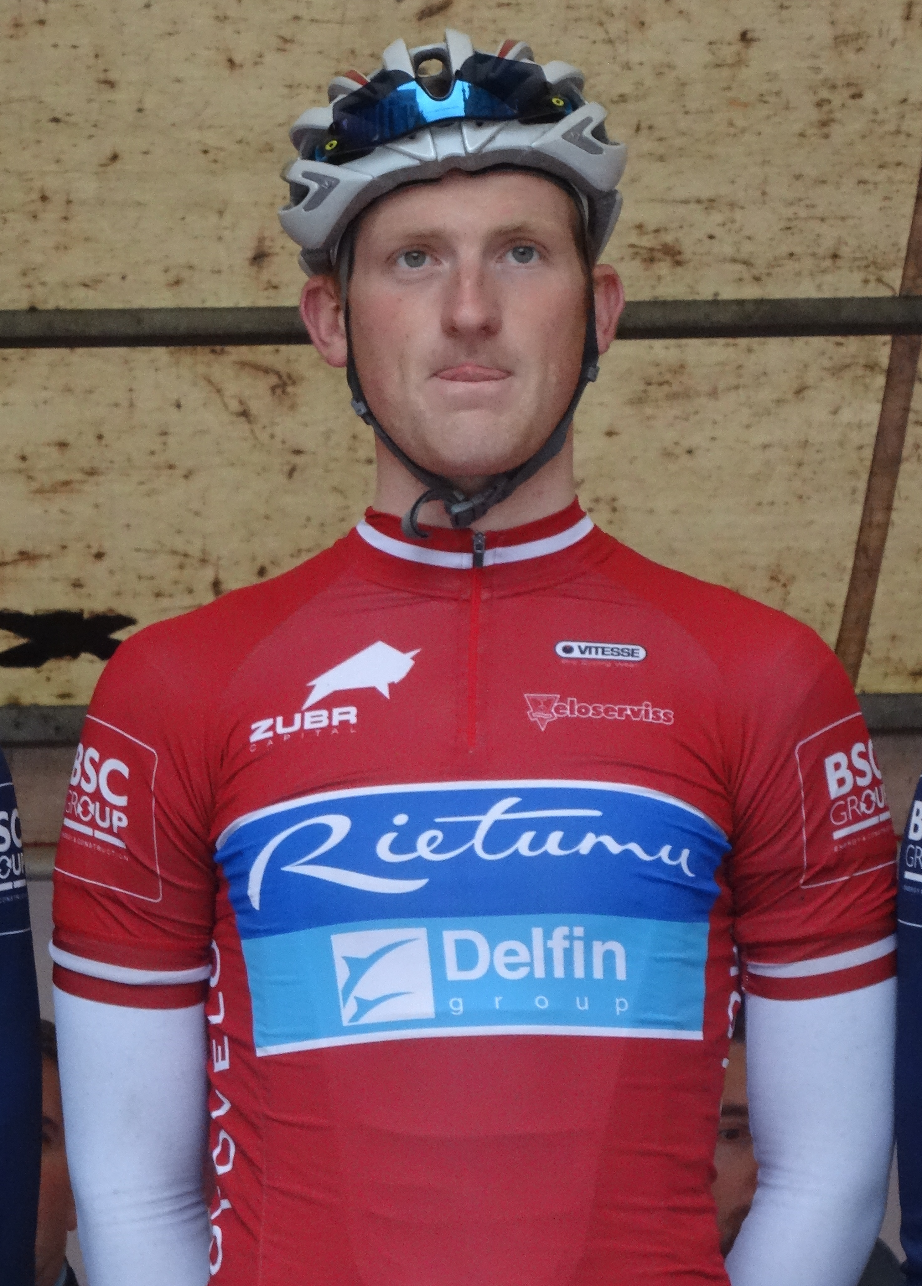 Reportage photographique réalisé le dimanche 14 septembre à l'occasion du départ et de l'arrivée du Grand Prix Jef Scherens 2014 à Louvain, Belgique.